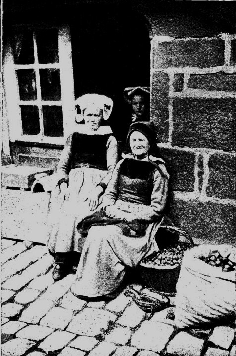 Marchands de pommes sur la commune du Faou dans le département français du Finistère.